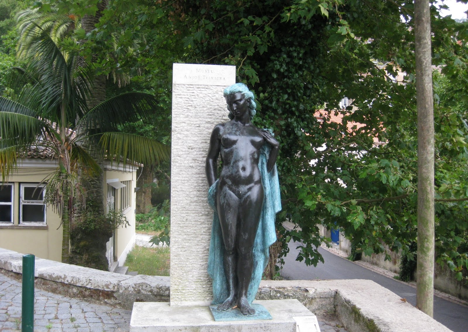 Uma das estátuas em bronze Nu(s) feminino(s) de Pedro Anjos Teixeira (filho de Artur Anjos Teixeira), de 1942. A estátua localiza-se em Volta do Duche, Sintra, junto às escadas que dão acesso ao Museu Anjos Teixeira.